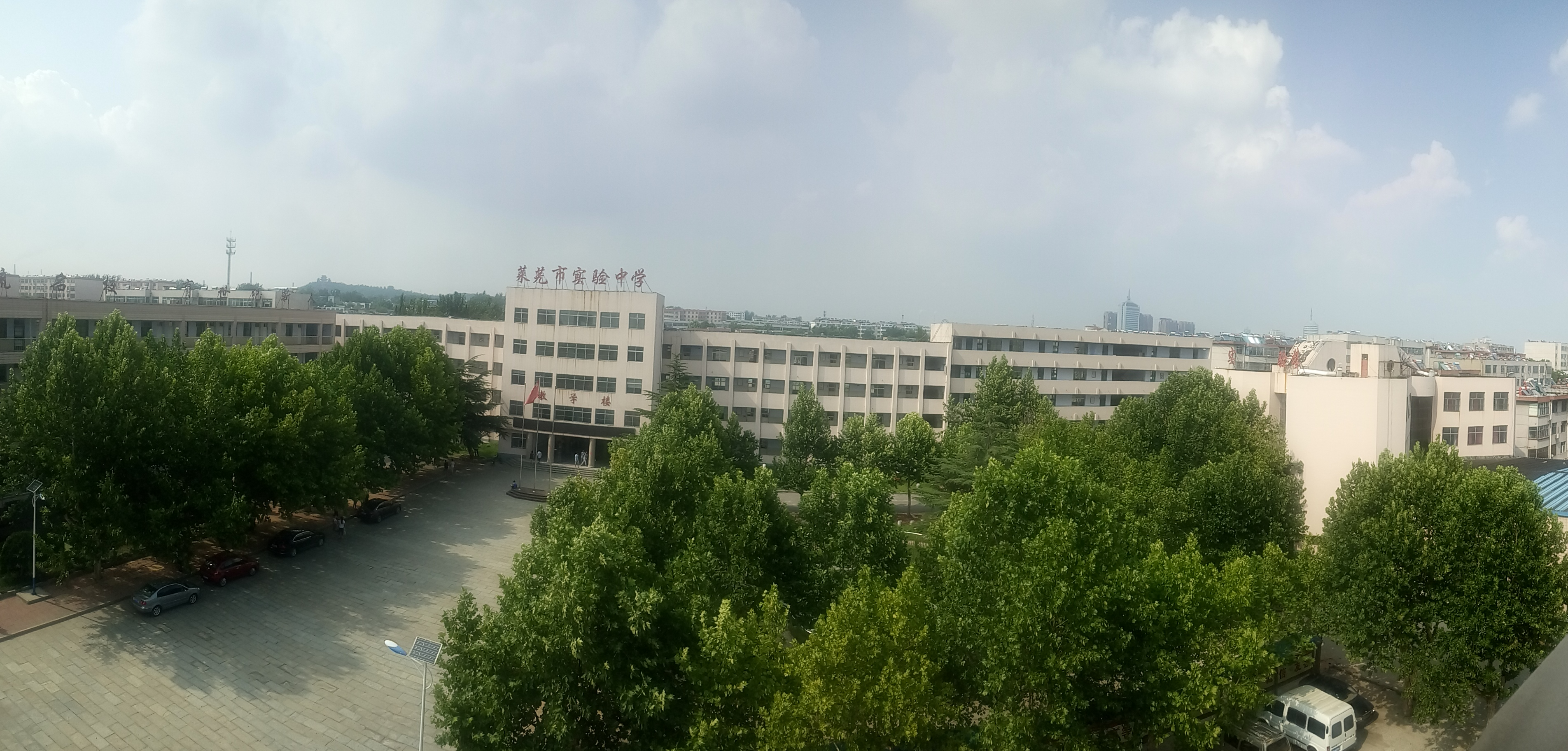 莱芜市实验中学北校区全景